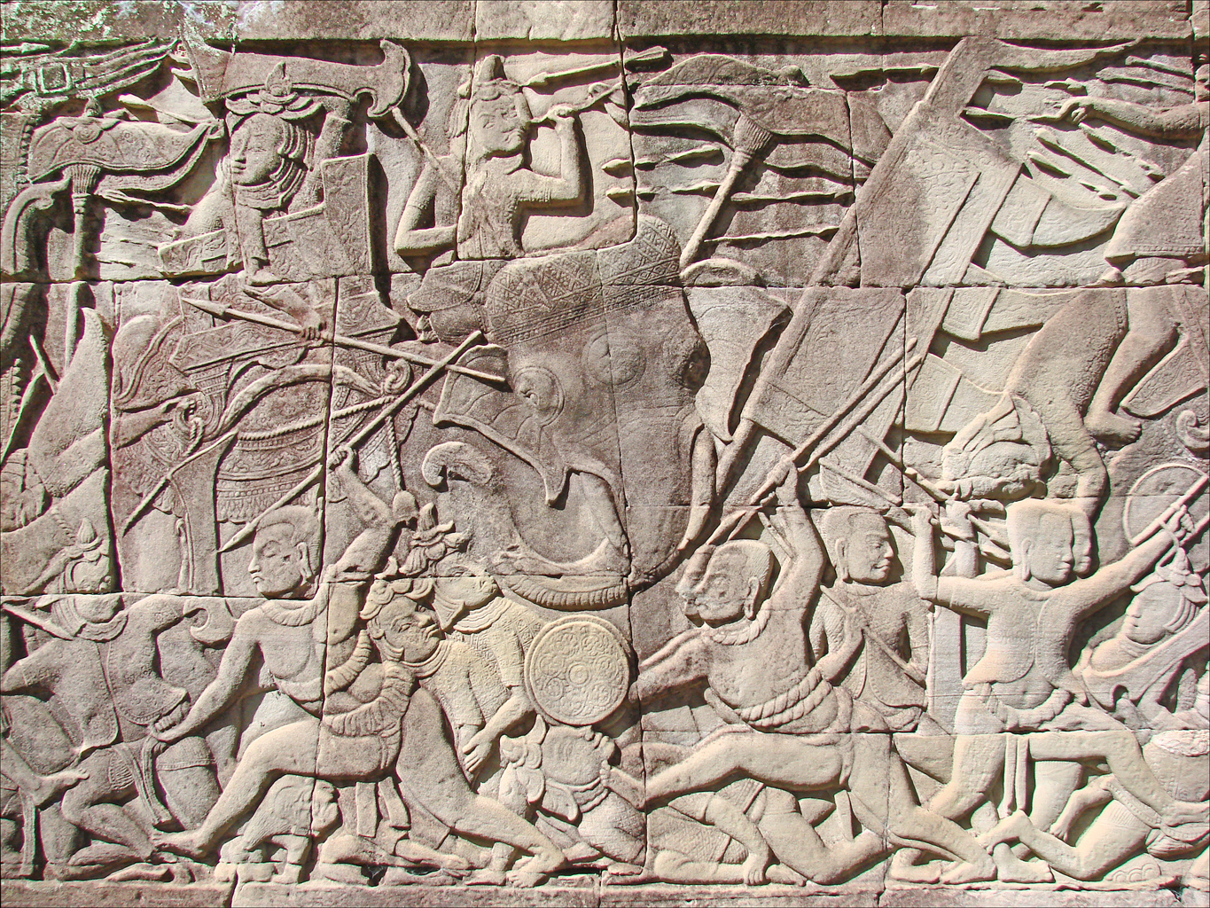 La guerre entre les khmers et les chams, au-dessus un chef militaire sur un éléphant Galerie est du Bayon (Angkor) _________________ Le Bayon est le temple-montagne du roi khmer : Jayavarman VII (1181-1218), le vainqueur des Chams et le plus grand constructeur des rois khmers. La construction du Bayon a commencé vers 1195. Ce temple est célèbre pour ses 54 tours décorées par 4 visages. Comme temple d'Etat, il était au centre d'Angkor Thom, la capitale du royaume. C'est un temple "œcuménique " qui associe l'hindouisme (les dieux Shiva et Vishnu y sont largement présents) et le bouddhisme car le Roi était lui-même bouddhiste du grand véhicule : Mahâyâna. Le Roi et la famille royale étaient représentés dans le Bayon sous forme de bouddhas dans les chapelles entourant la grande tour centrale.